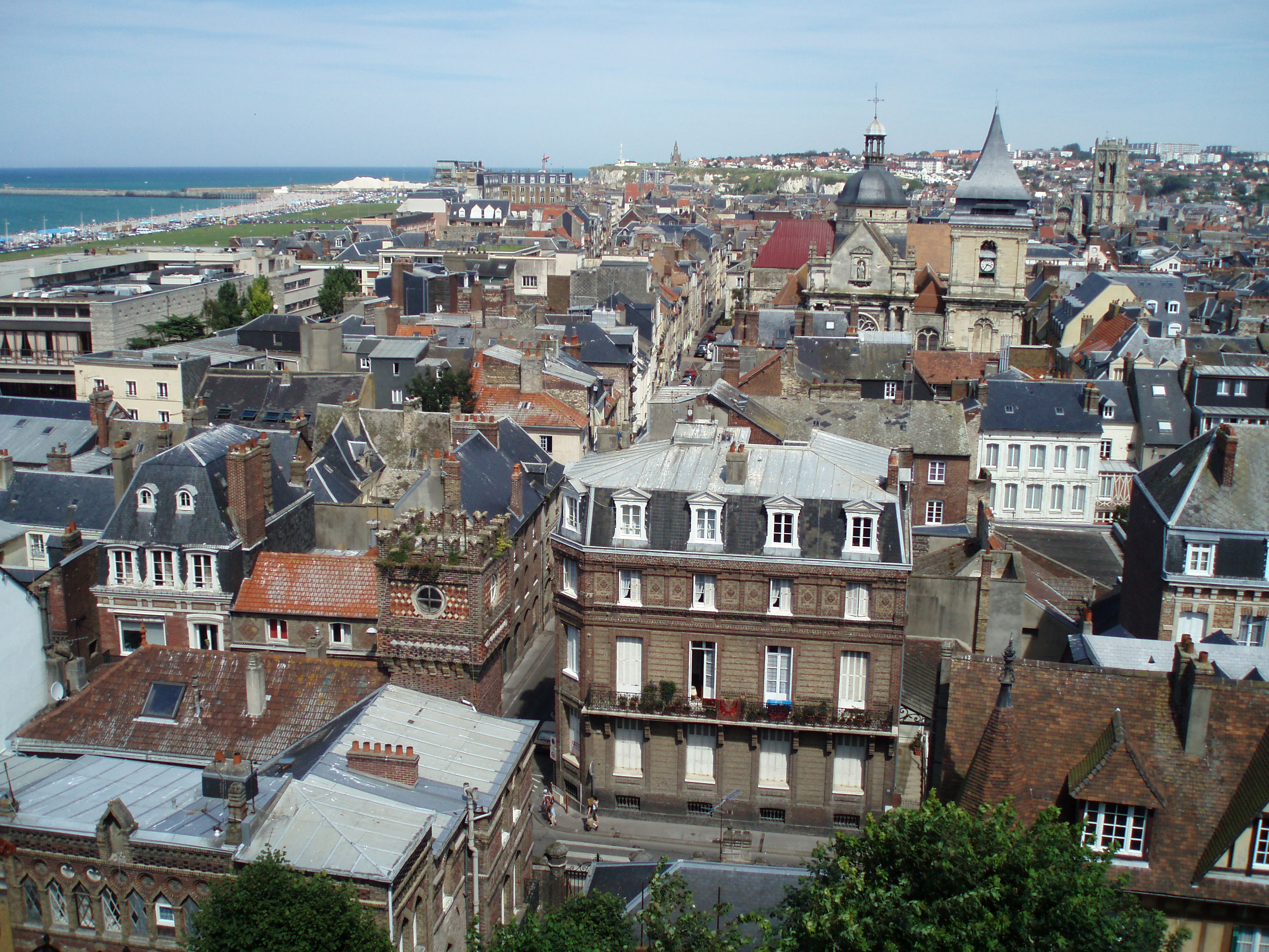 Vue sur le centre-ville de Dieppe (France)